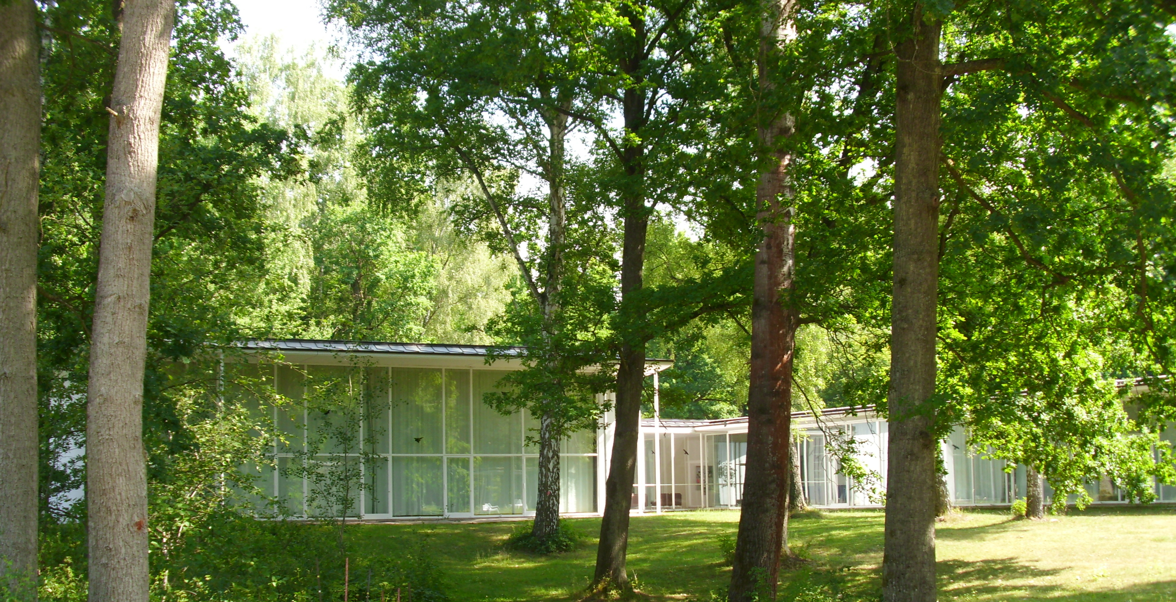 Panoramabild Aula mit langem Bau